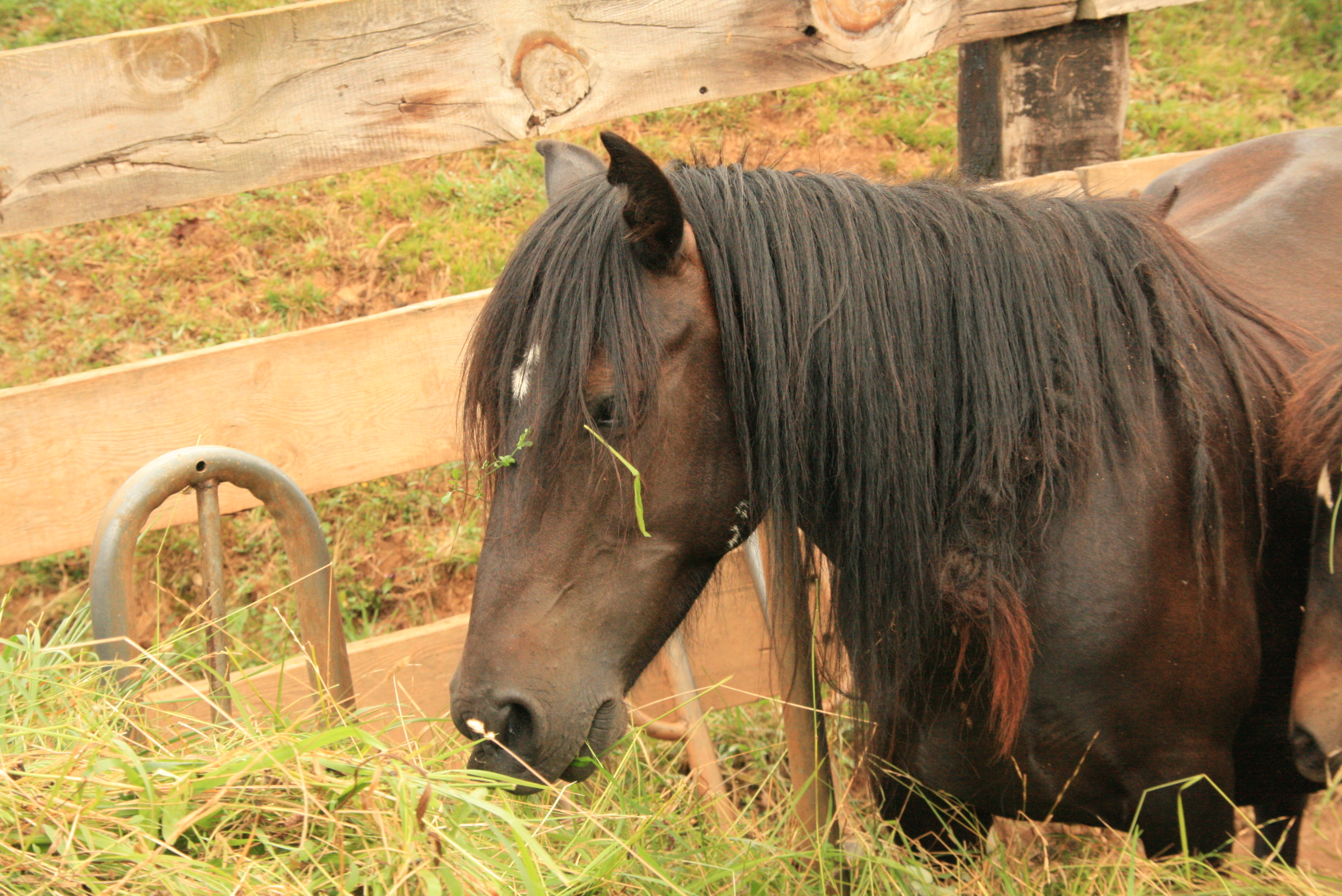 Caballo monchinoen el Parque de la naturaleza de Cabárceno